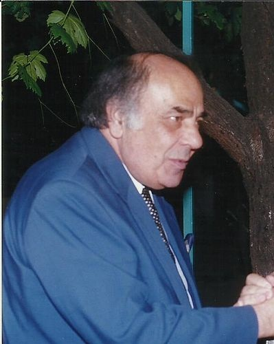 Mansour Rahbani (1925-2009) compositor Libanés.